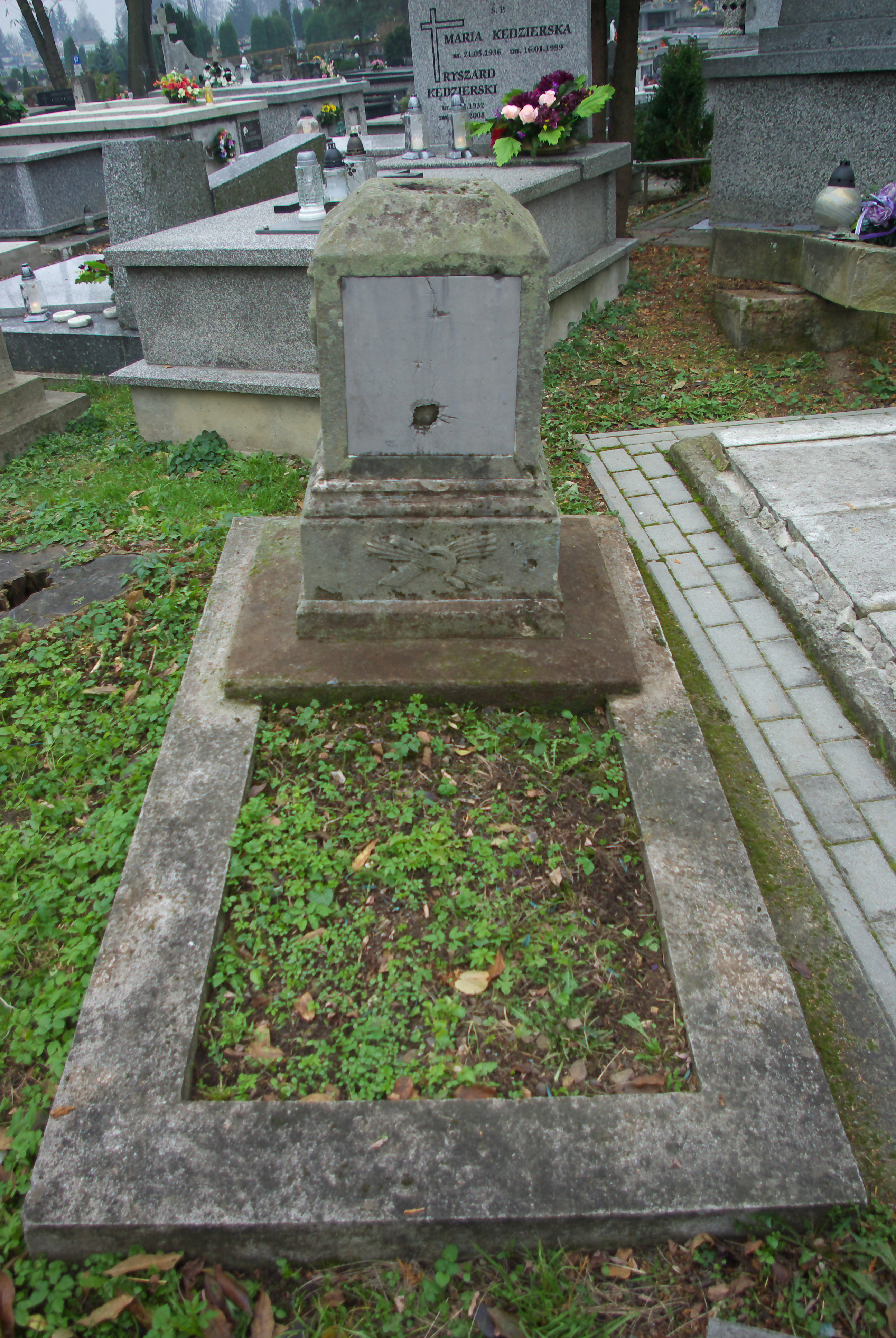 Nagrobek Jerzego i Józefy Rapf na Cmentarzu Centralnym w Sanoku